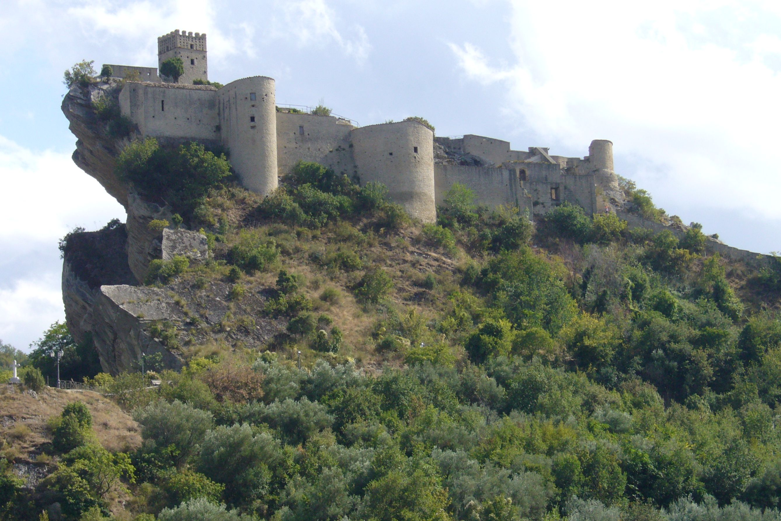 Il Castello